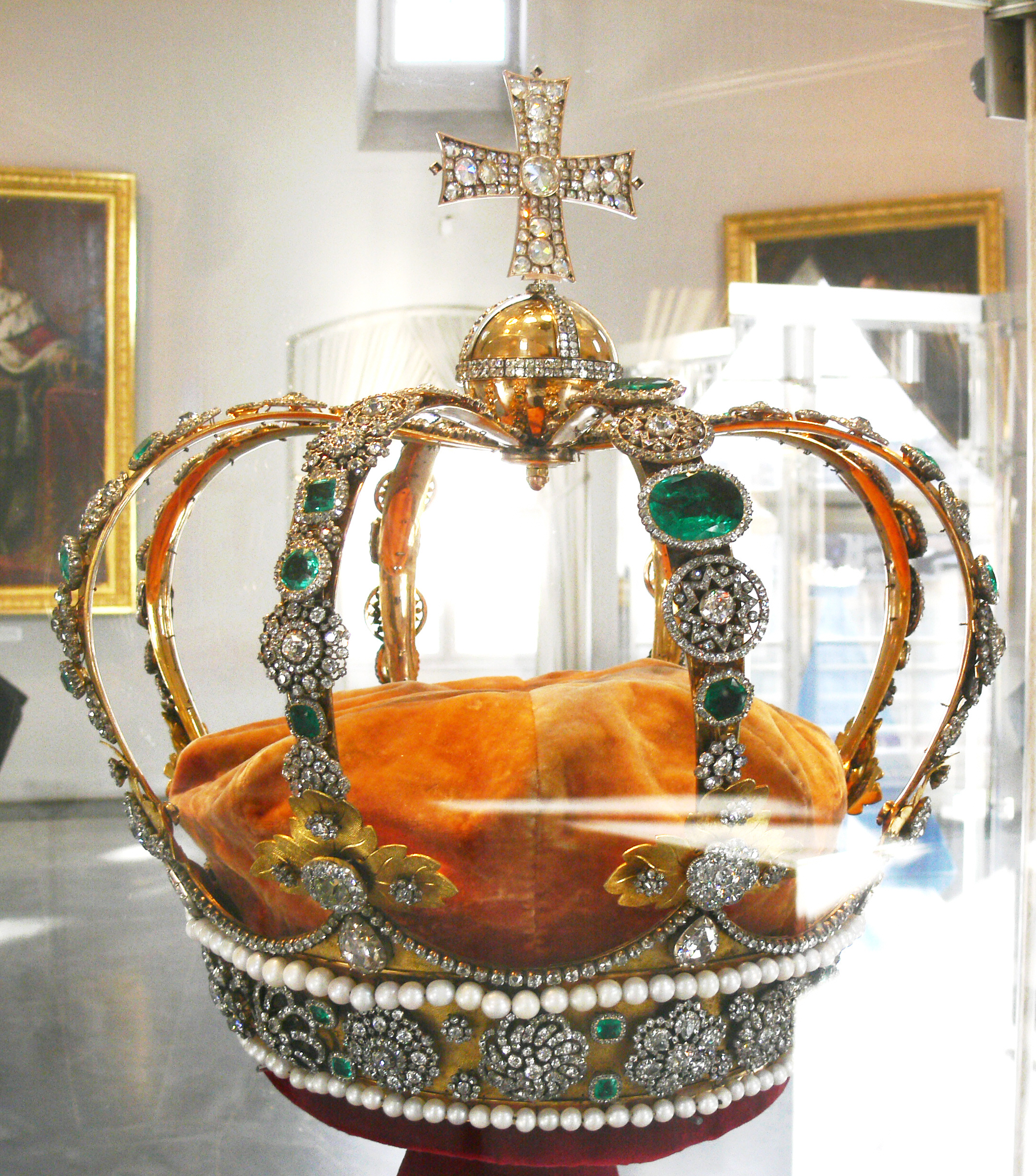 Württembergische Königskrone; aus dem Kronschatz, Württembergisches Landesmuseum Stuttgart.